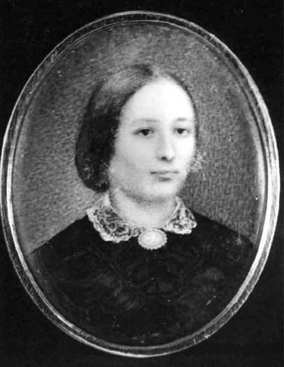 Мария Владимировна Станкевич, в замужестве Фролова (1822–1850).